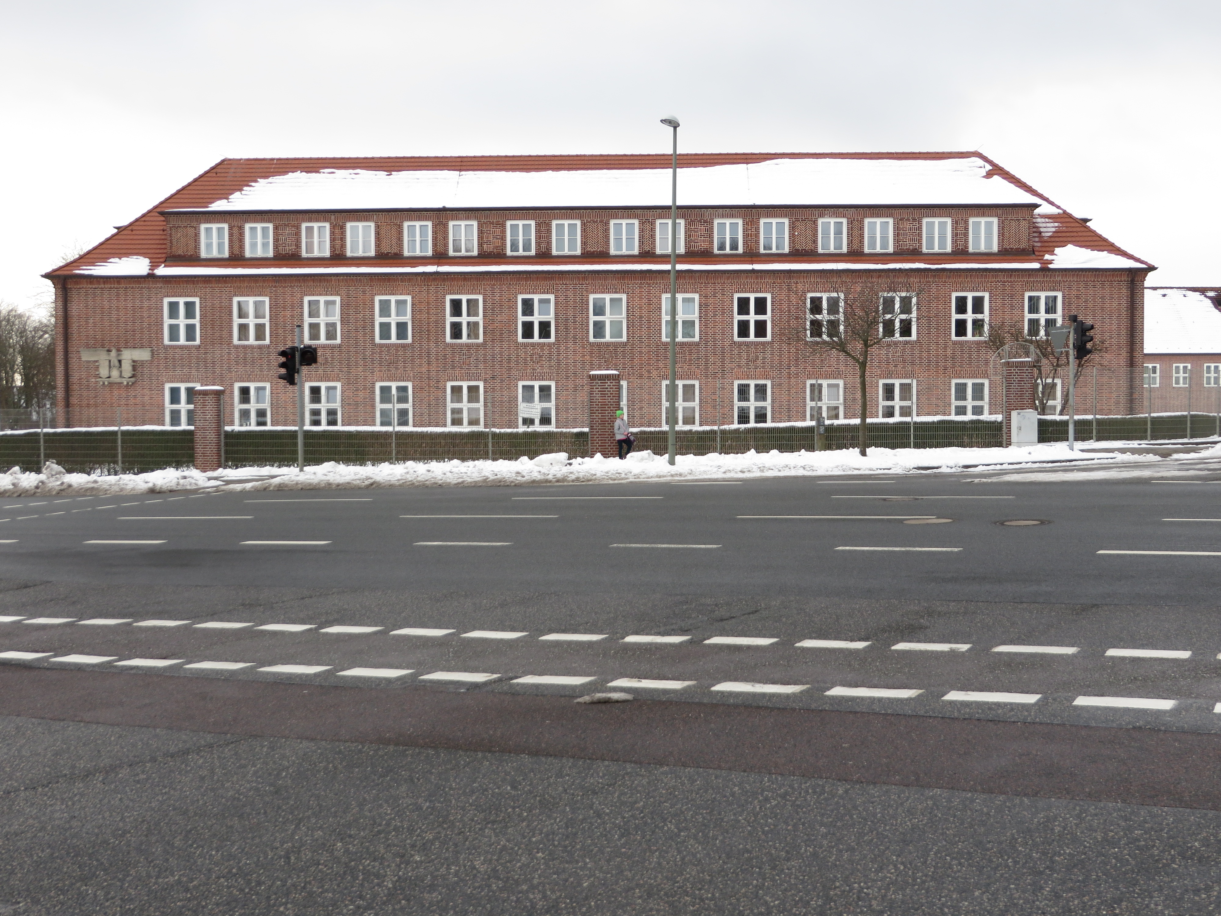 Marinesportschule Flensburg-Mürwik Februar 2015, Bild 04